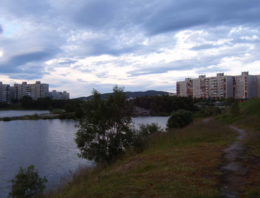 Глубокие озёра в Южном микрорайоне Мурманска, улица Крупская.